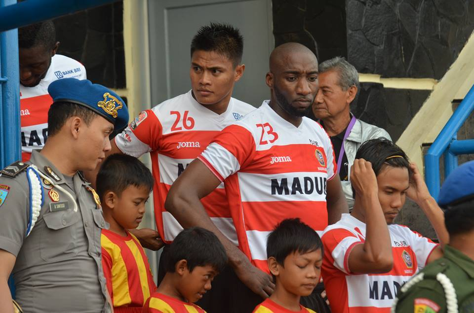 Image de Club